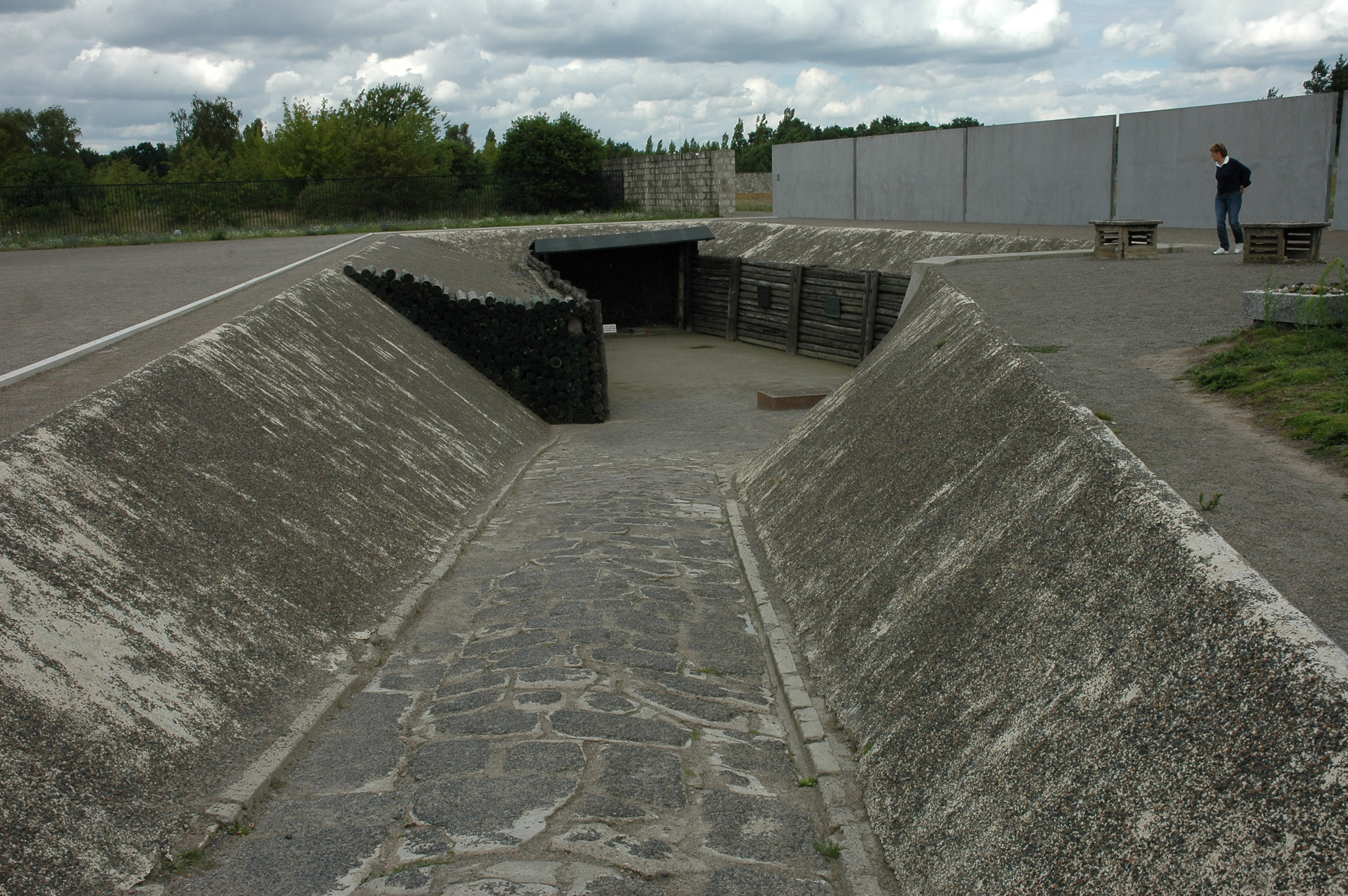 Station in Sachsenhausen concentration camp Stasjon Z i Sachsenhausen konsentrasjonsleir